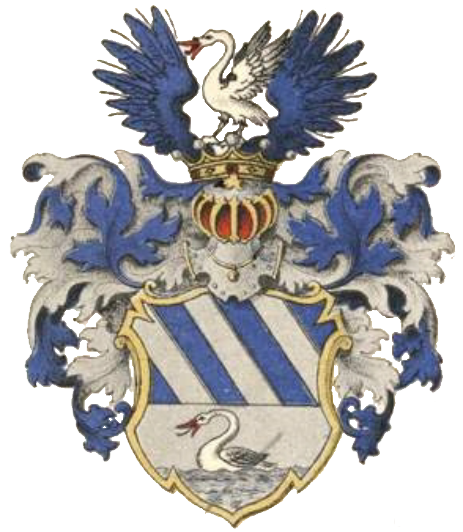 Hanseni suguvõsa aadlivapp